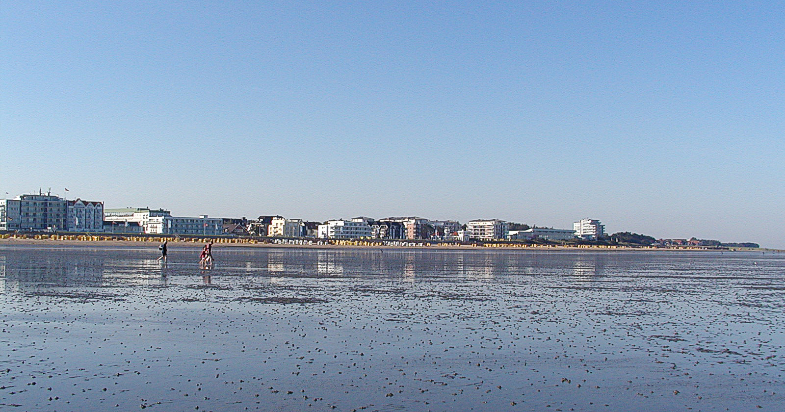 Duhnen vom Watt gesehen